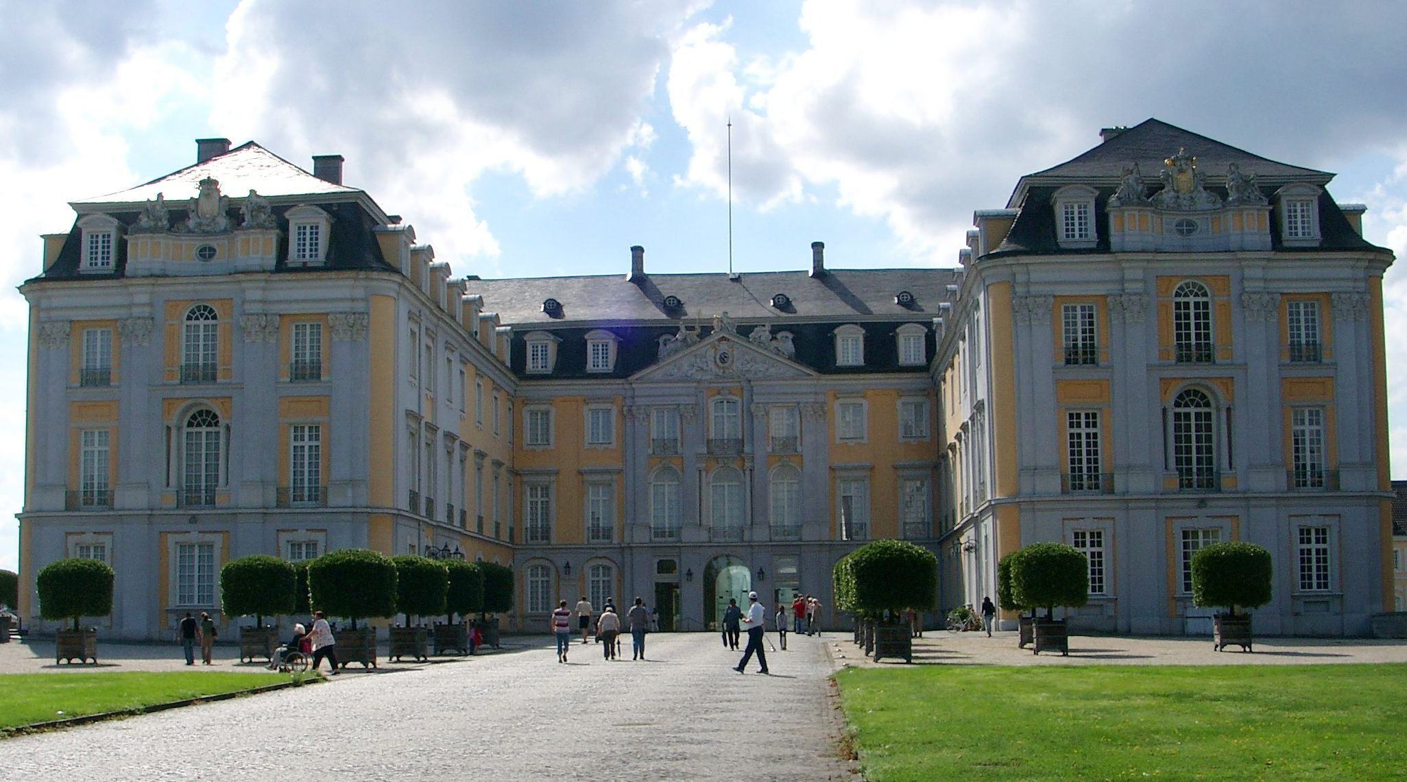 Schloss Augustusburg in der Stadt Brühl